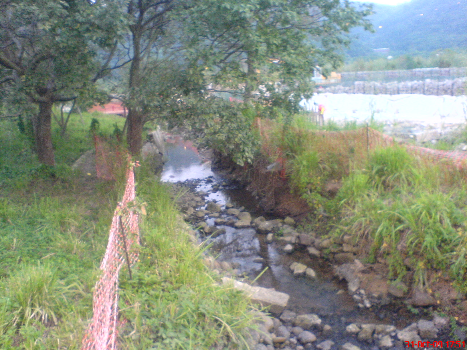 銀河中游，鹿地塘河的支流。攝於近梅窩花園的河邊。